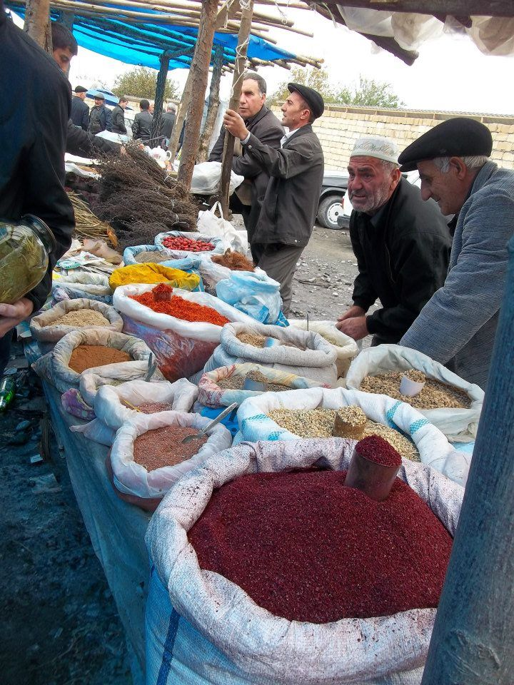 Wieś Nidż, Azerbejdżan - targ.